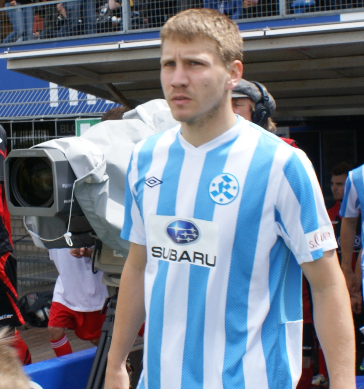 Patrick Auracher im Trikot der Stuttgarter Kickers